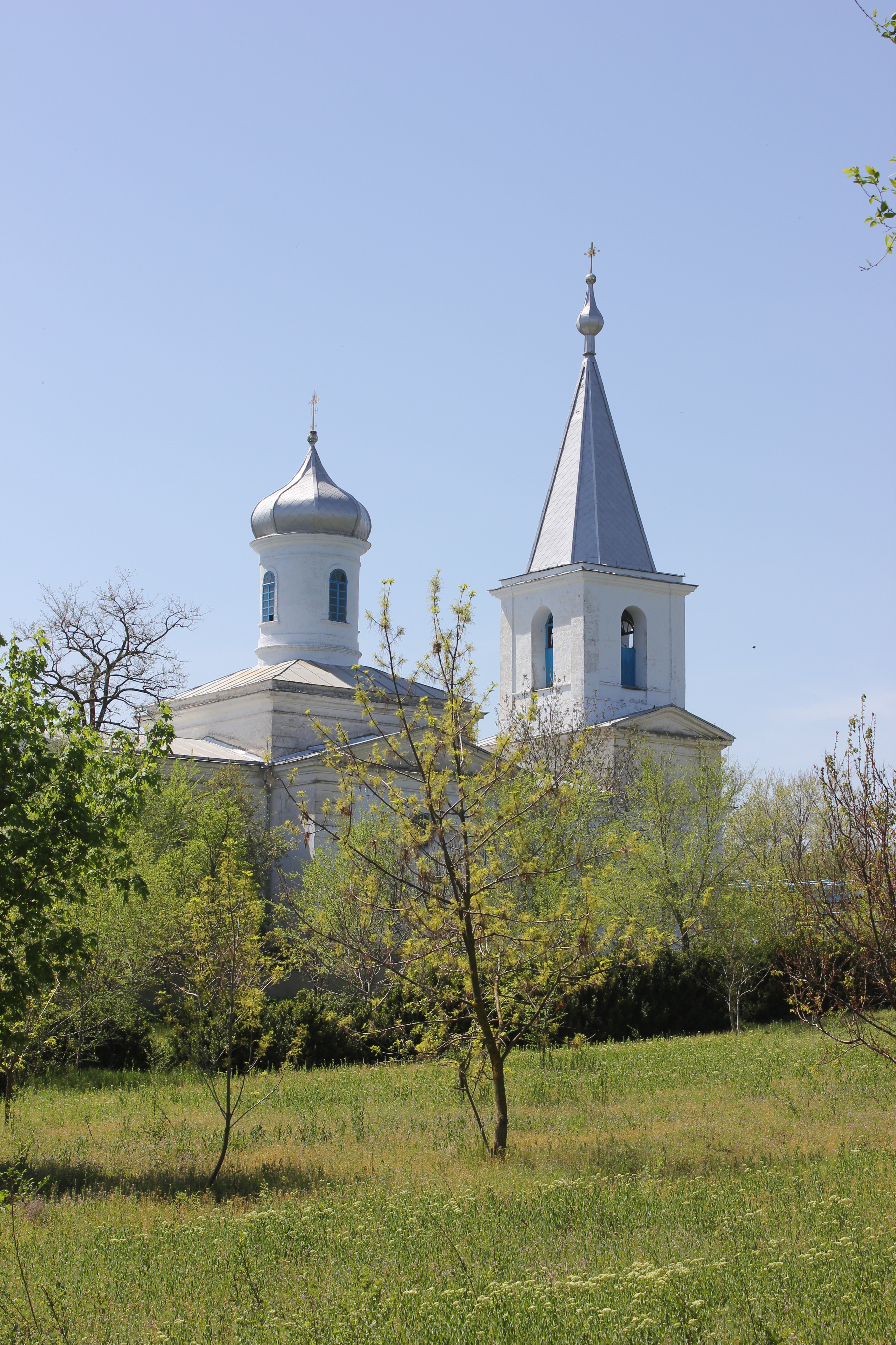 Церква Дмитріївська (Свято-Успенська), с. Задунаївка